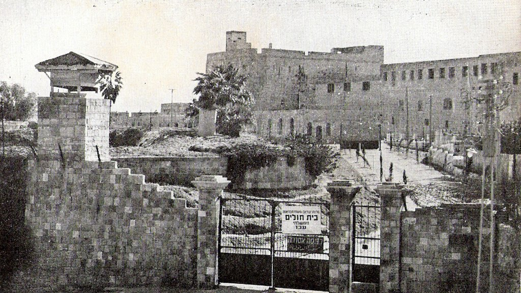 מבצר עכו בראשית שנות החמישים.